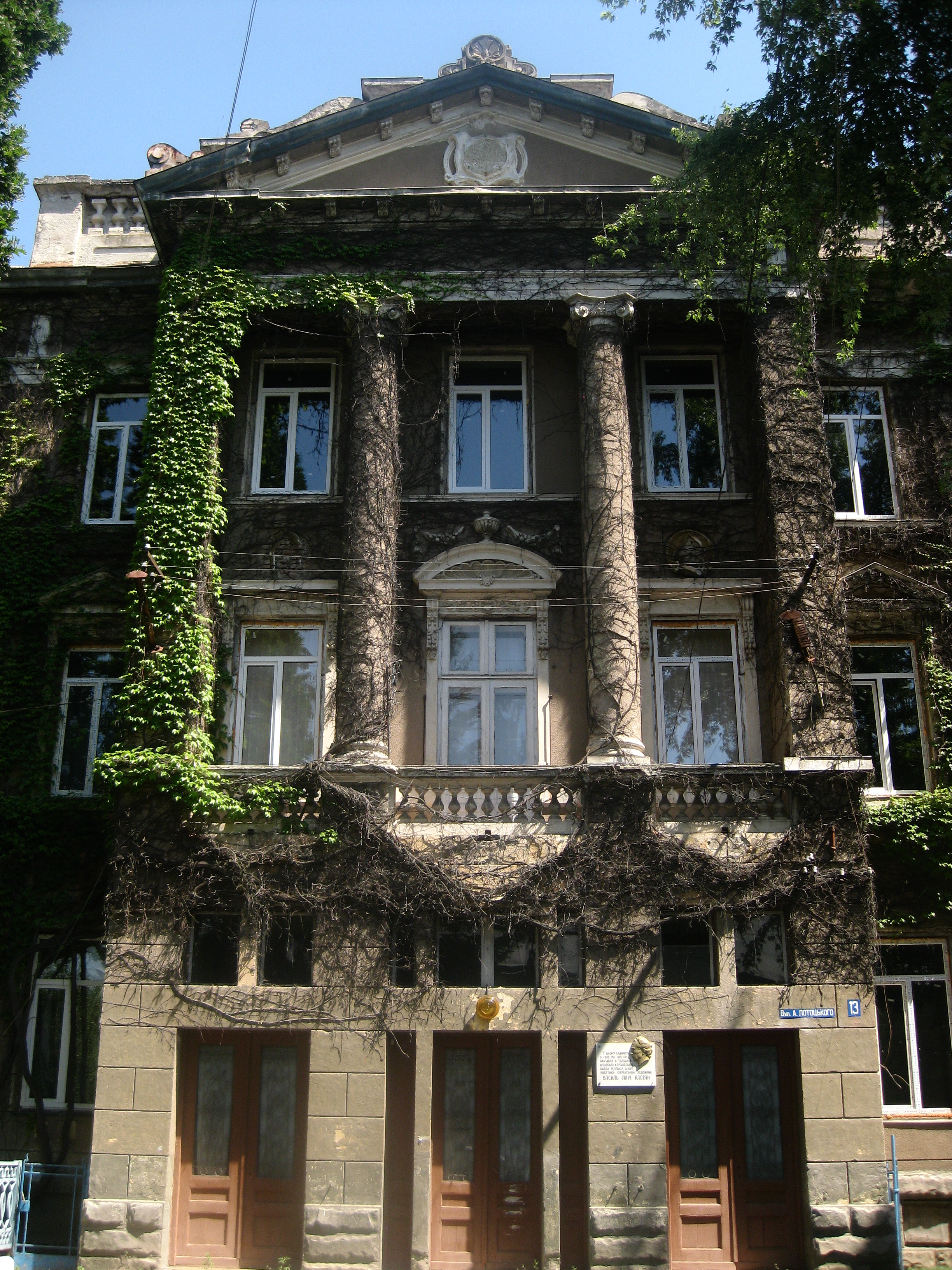 Цісарсько-королівська реальна школа з 1924 р. чол. гімназія (мур.), Снятин, вул. Лотоцького, 13